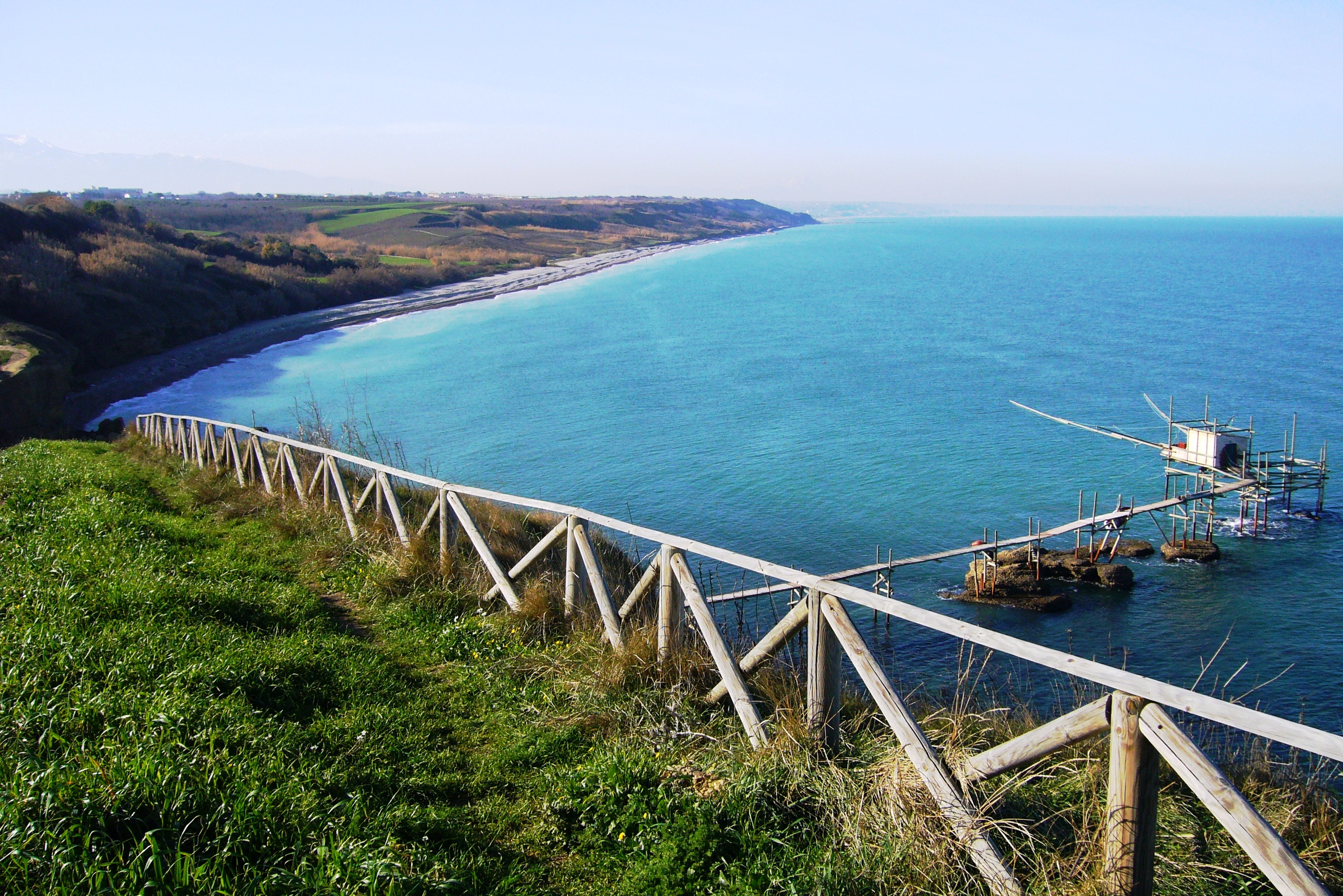 Vista su Punta Aderci col Trabocco